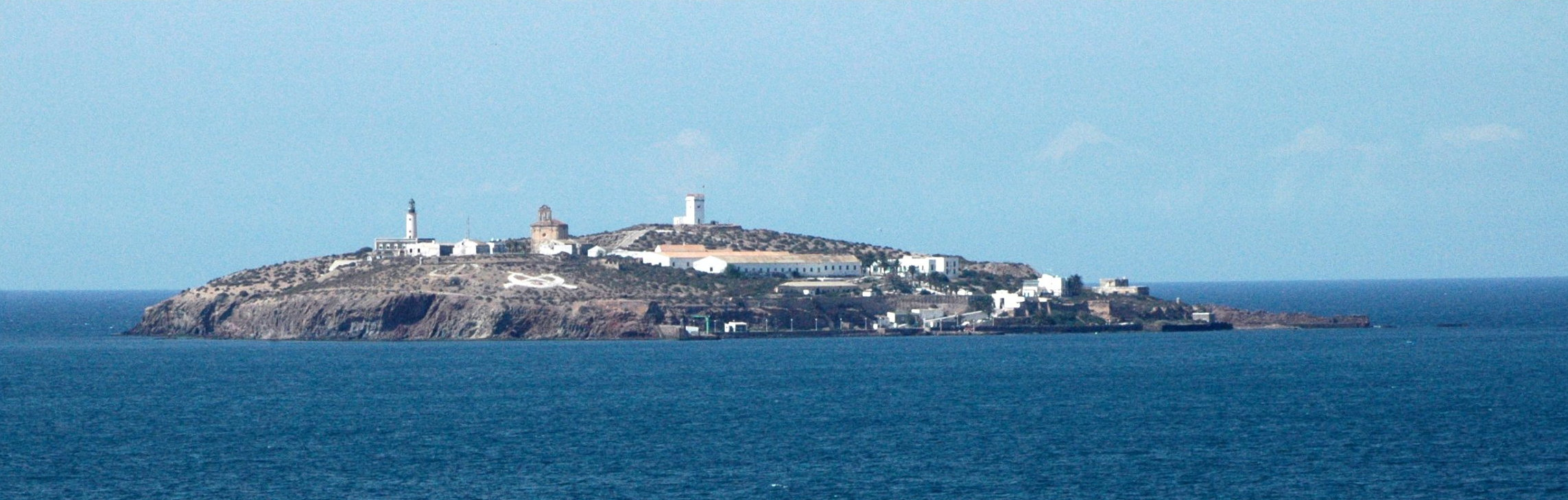 Isla de Isabel II (Chafarinas) desde el cabo de Agua (Marruecos)